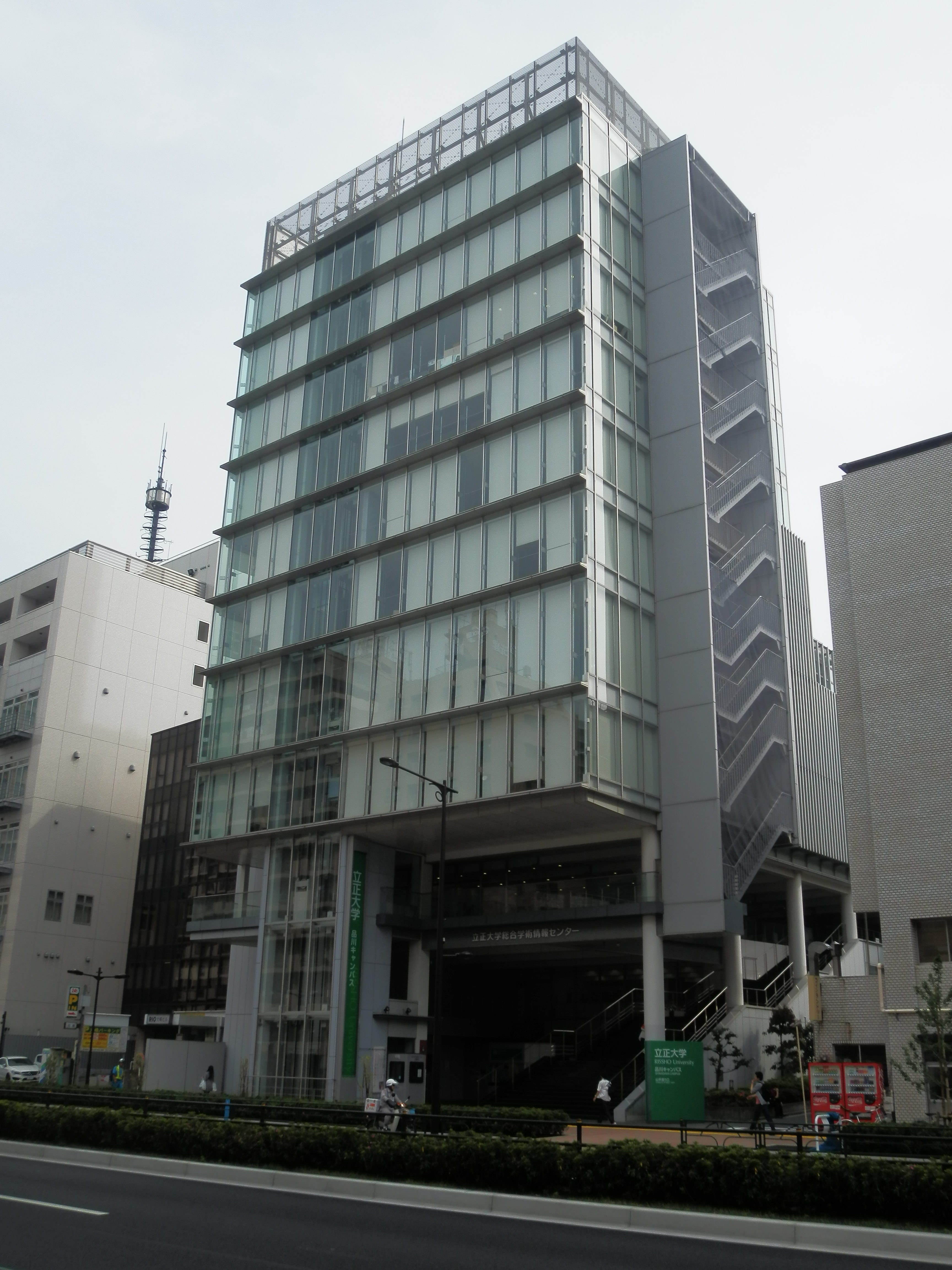 図書館などが入居する総合学術情報センター。